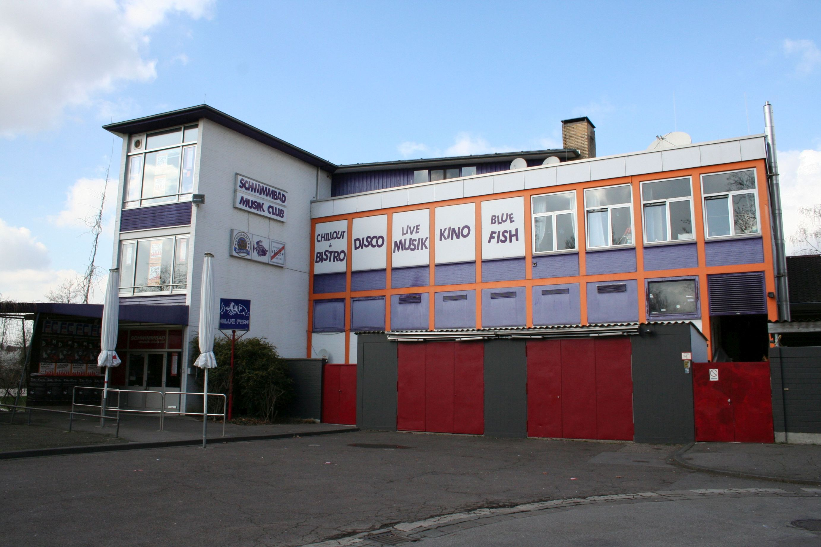 Ehemaliger Schwimmbad-Musikclub in der Tiergartenstraße 13 (neben dem Freibad Tiergartenbad) in der kurpfälzischen Stadt Heidelberg. Seit Mai 2017 ist das Gebäudeabgerissen.